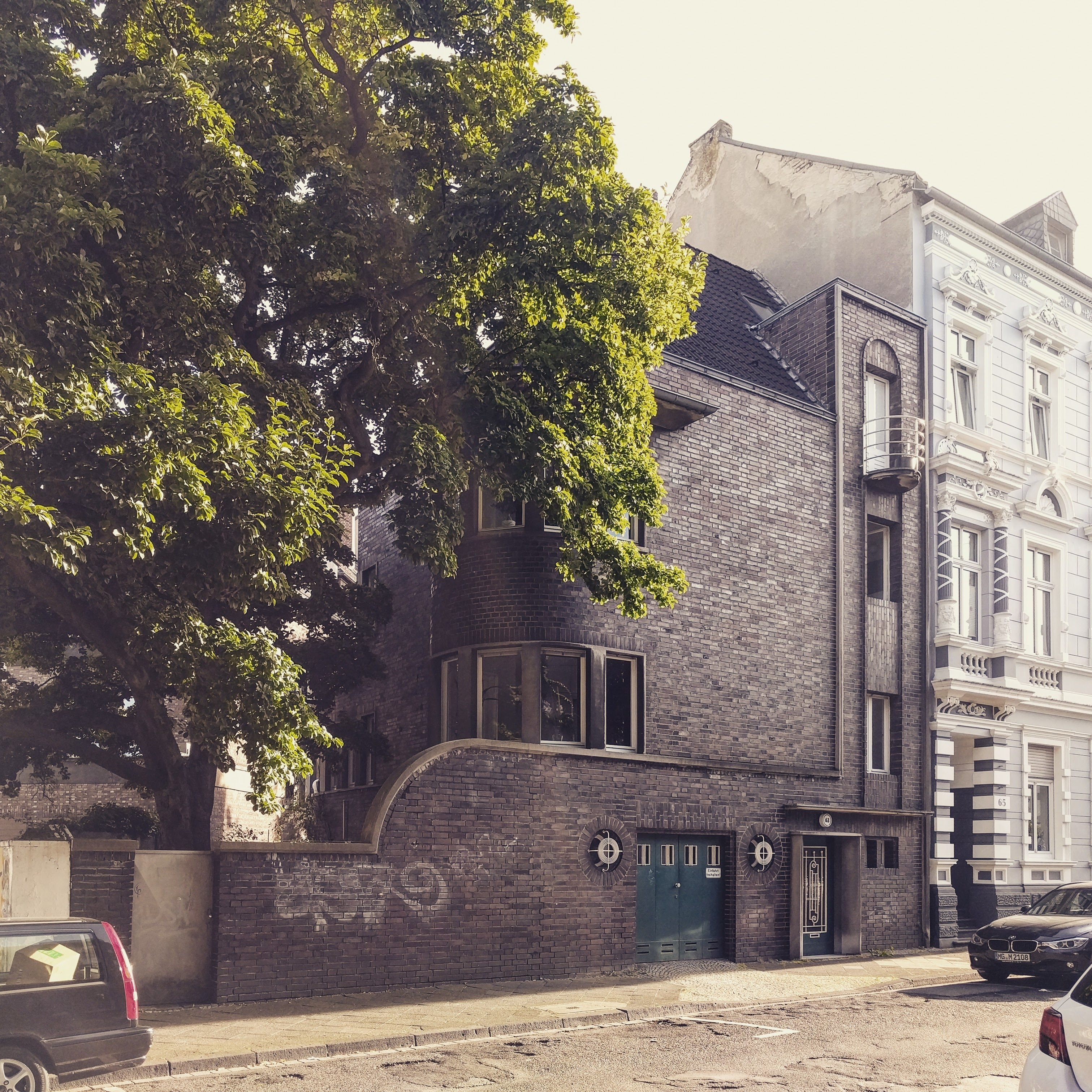 Modernes Wohnhaus der 1930er Jahre mit Einflüssen der Stromlinien-Moderne: Halbrunder Erker, Paradebalkon mit Schiffsreling, Putzbänder, Fenster in Bullaugenform